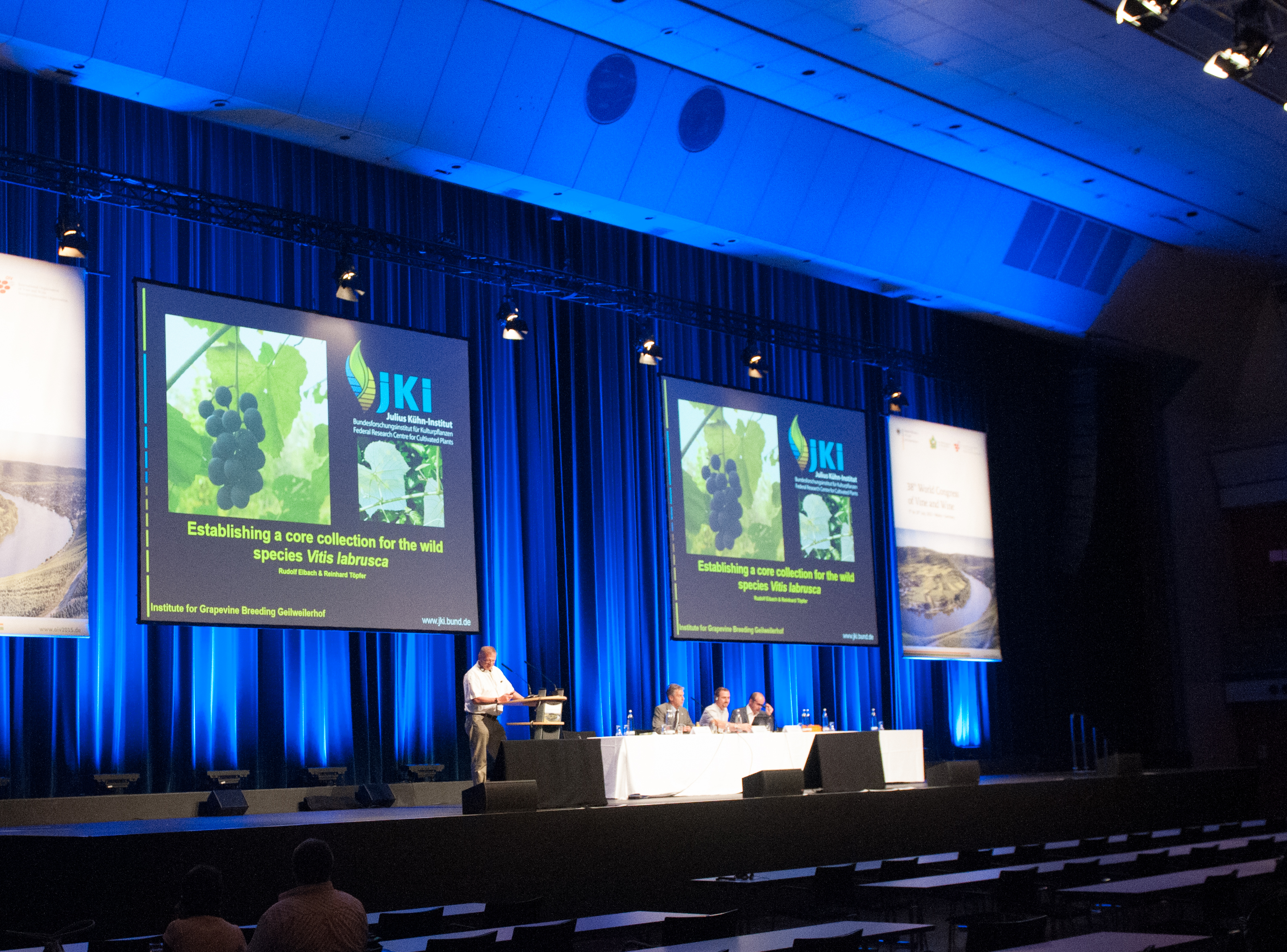 38th World Congress of Vine and Wine in Mainz - 38. Weltkongress für Rebe und Wein. 5.-10. Juli 2015 in Mainz, Rheingoldhalle. Von links nach rechts: Hans Reiner Schultz, Gründungspräsident der Hochschule Geisenheim; Benjamin Bois, Dozent an der Université de Bourgogne-Franche-Comté; Franz G. Rosner, Research Manager des österreichischen Lehr- und Forschungszentrums für Wein- und Obstbau in Klosterneuburg